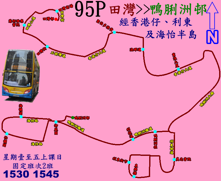 中文（香港）: 城巴95P線的走線圖